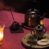 Bevanda naturale